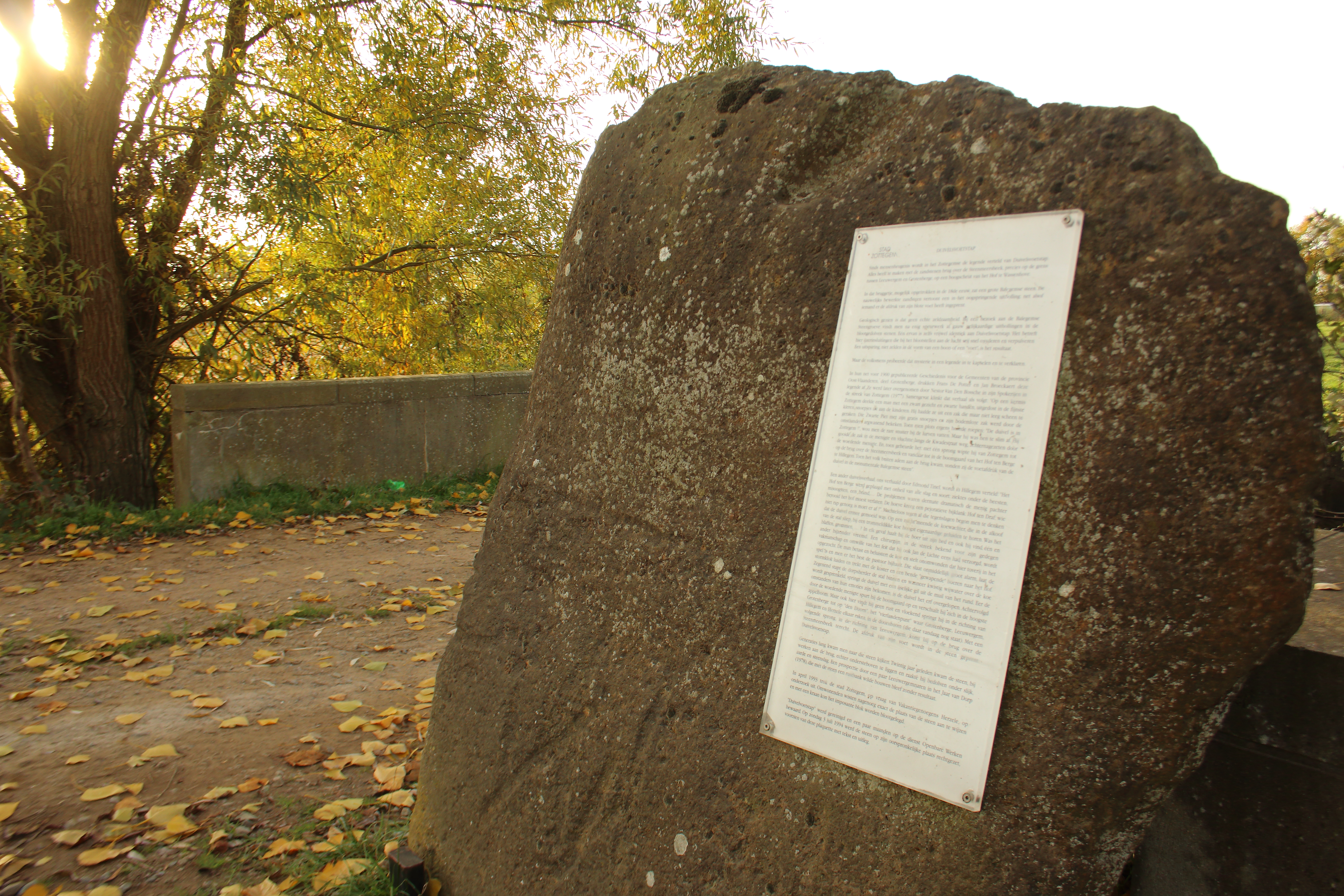 Duivelsvoetstap, Leeuwergem, Zottegem, Vlaanderen, België